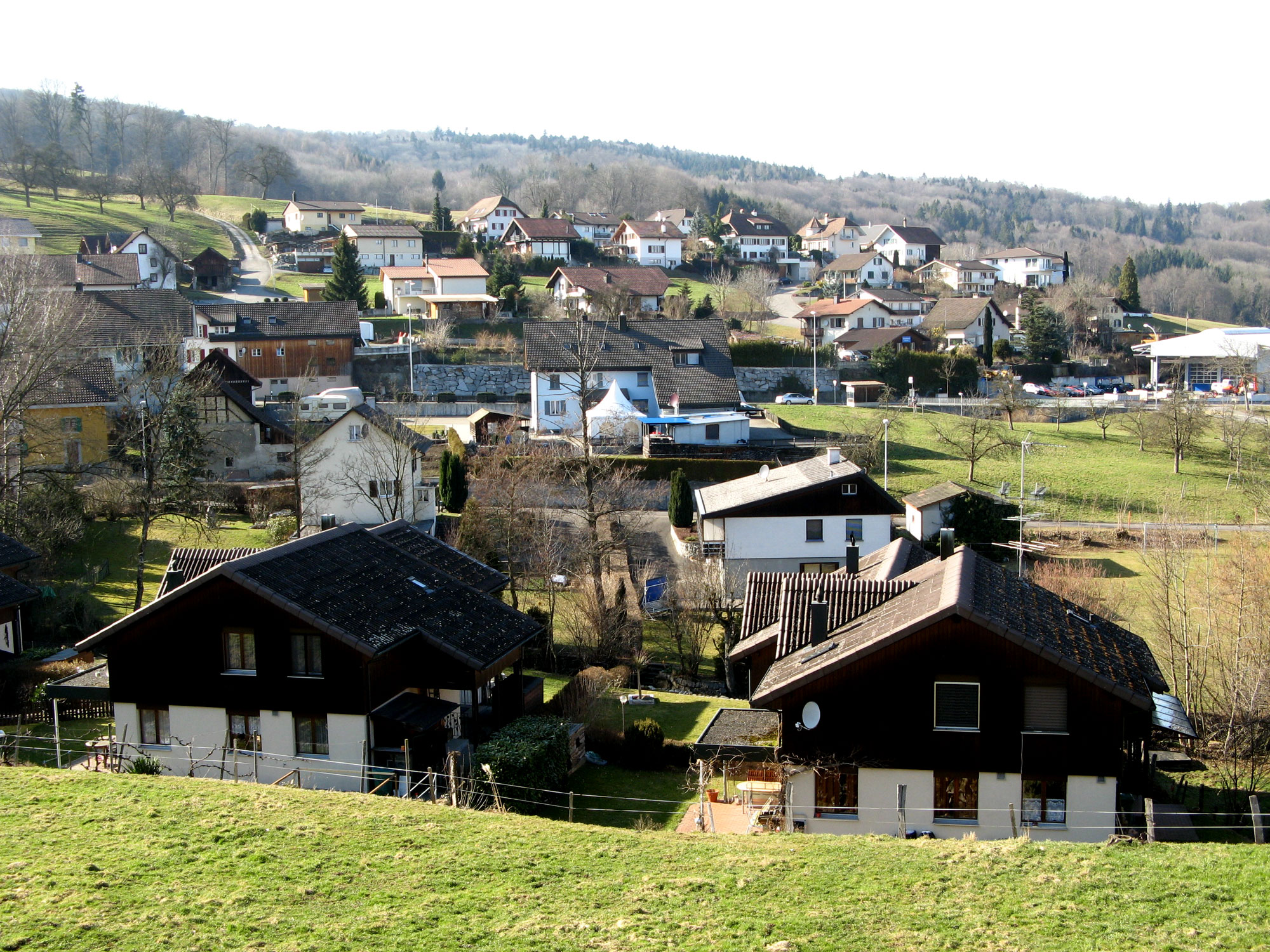 Dorfzentrum von Hilfikon